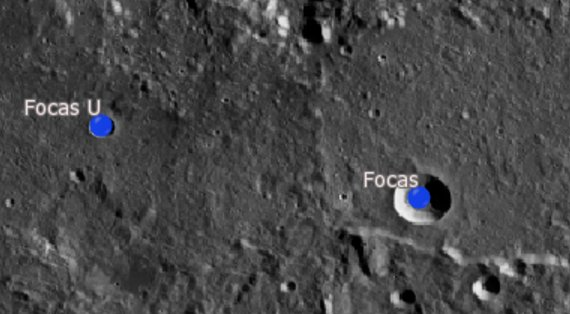 Cráter lunar Focas. Cráter satélite. (Imagen LROC)